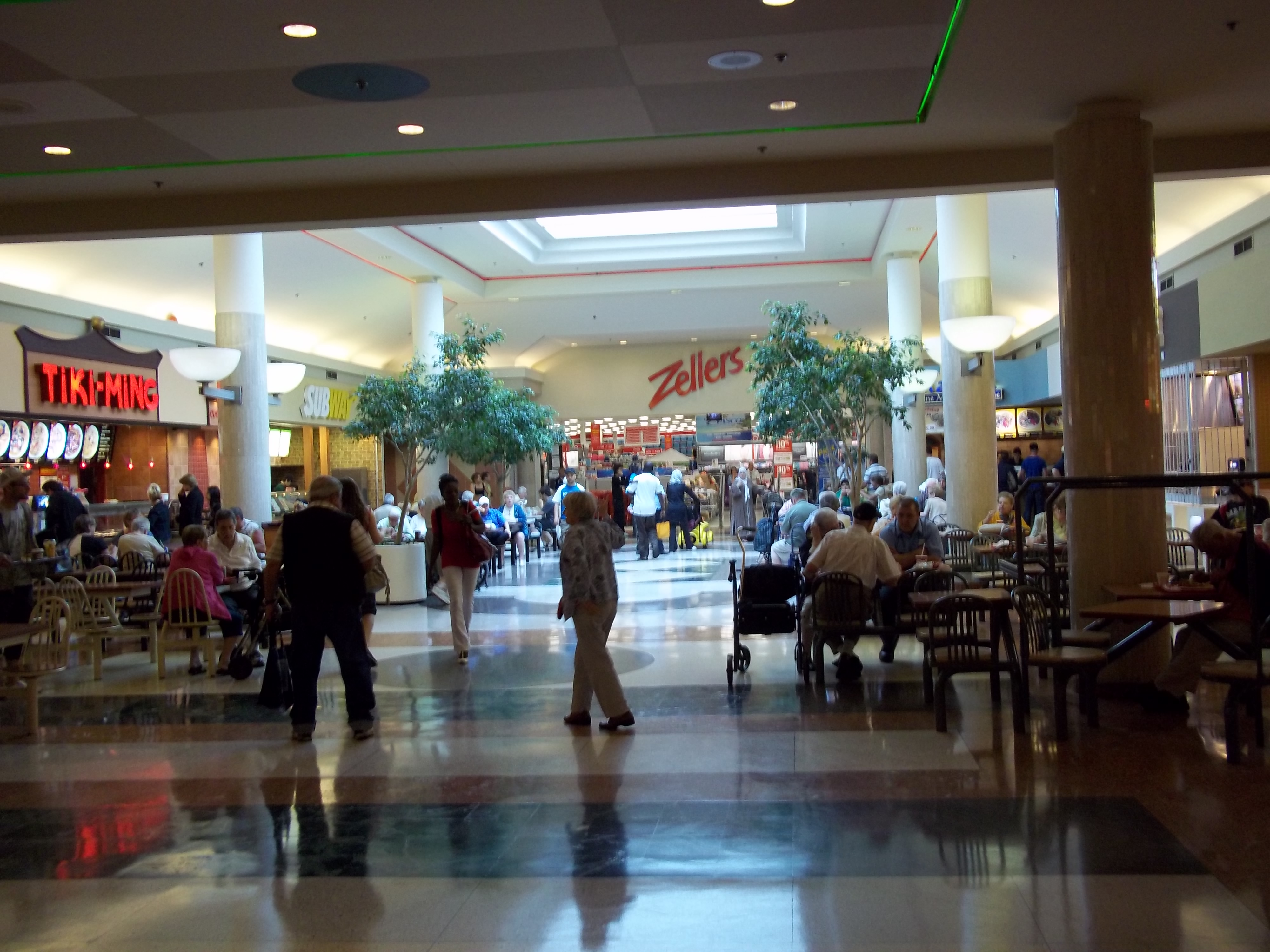 Place Versailles, Montréal